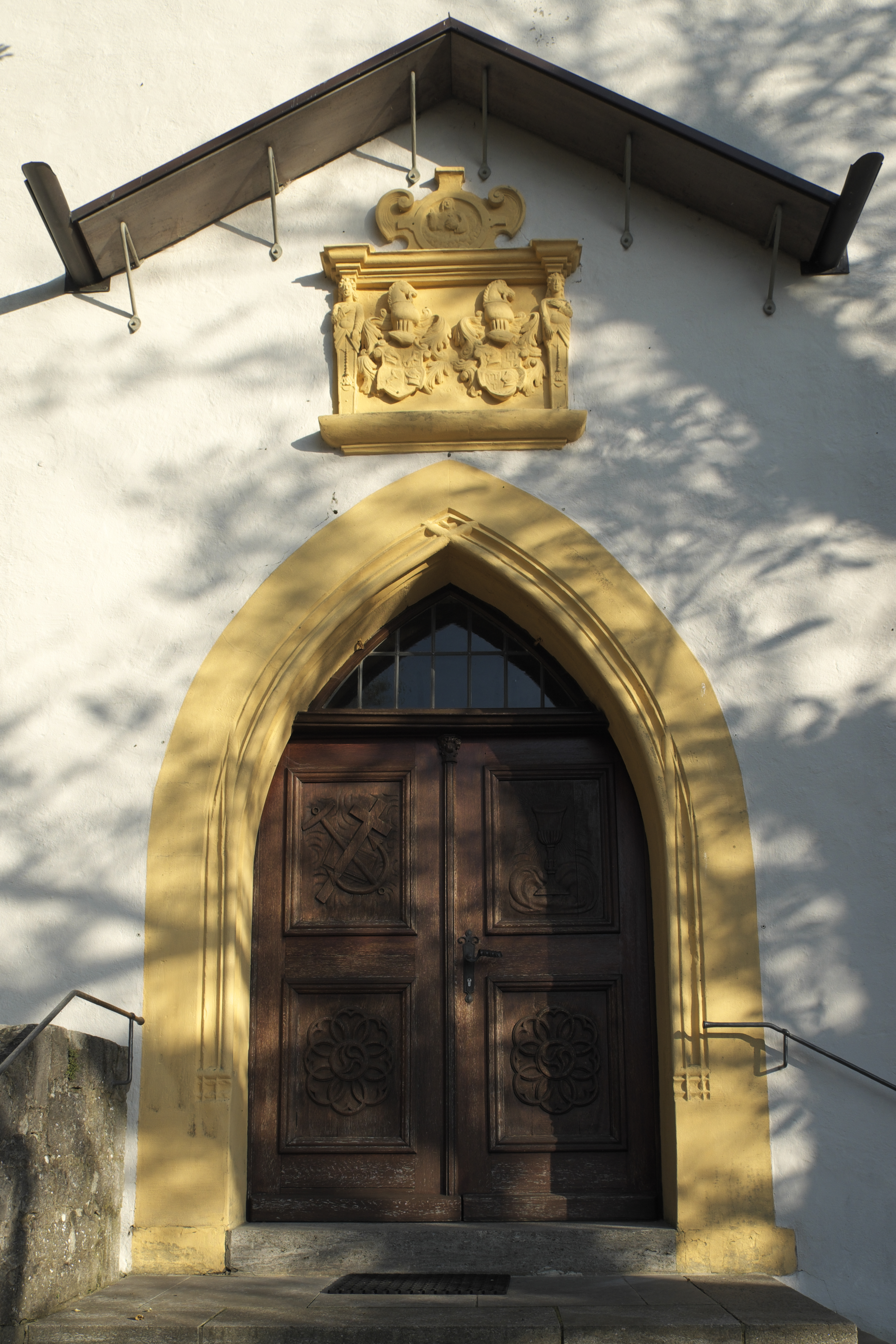 Evangelisch-Lutherische Pfarrkirche in Herchsheim, einem Ortsteil von Giebelstadt im Landkreis Würzburg in Unterfranken (Bayern), nachgotische Chorturmkirche von 1613, Portal